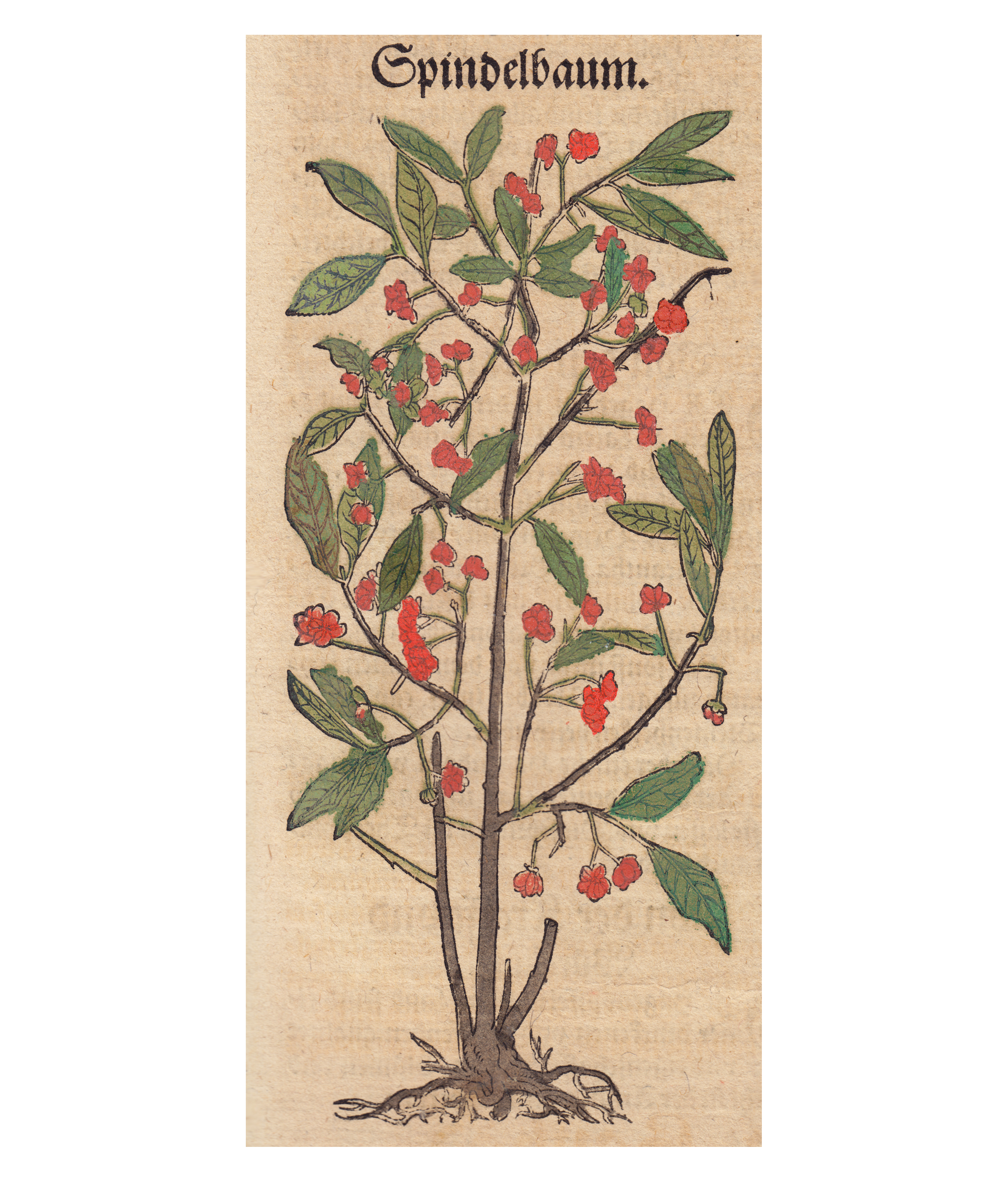 Abbildung von Euonymus europaea